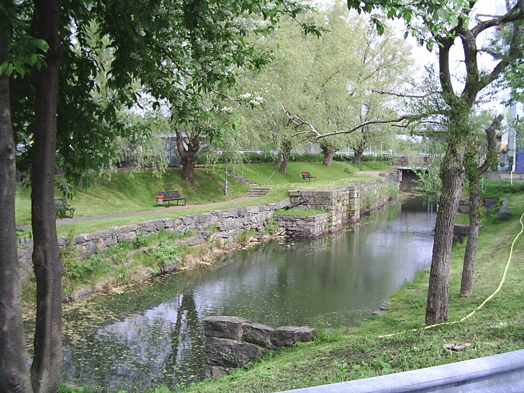 Lilla Edet lock - Swedens first lock from 1607